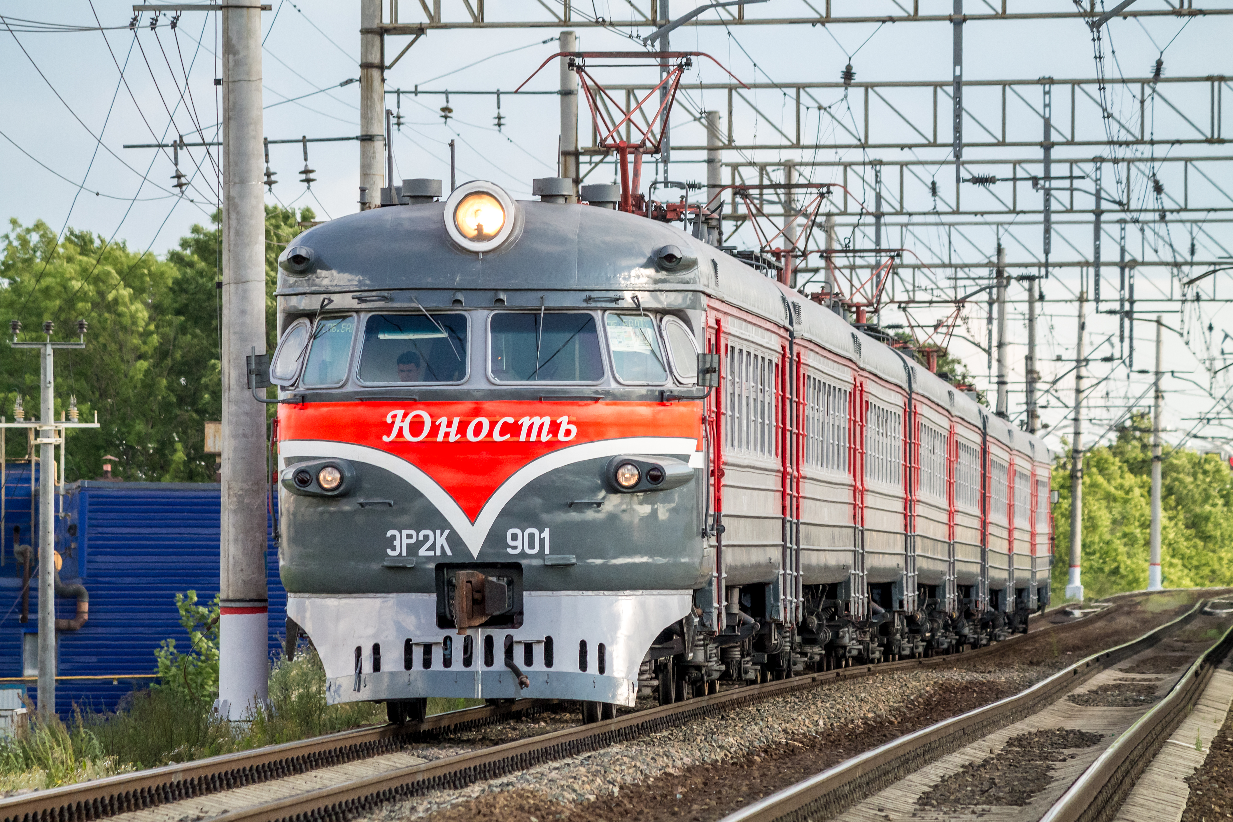 ЭР2К-901, Предпортовая - Броневая см. фото 696895 в альбоме автора